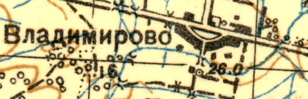 Топографическая карта Ленинградской области, квадрат О-35-12-Г (Ропша), деревня Владимировка